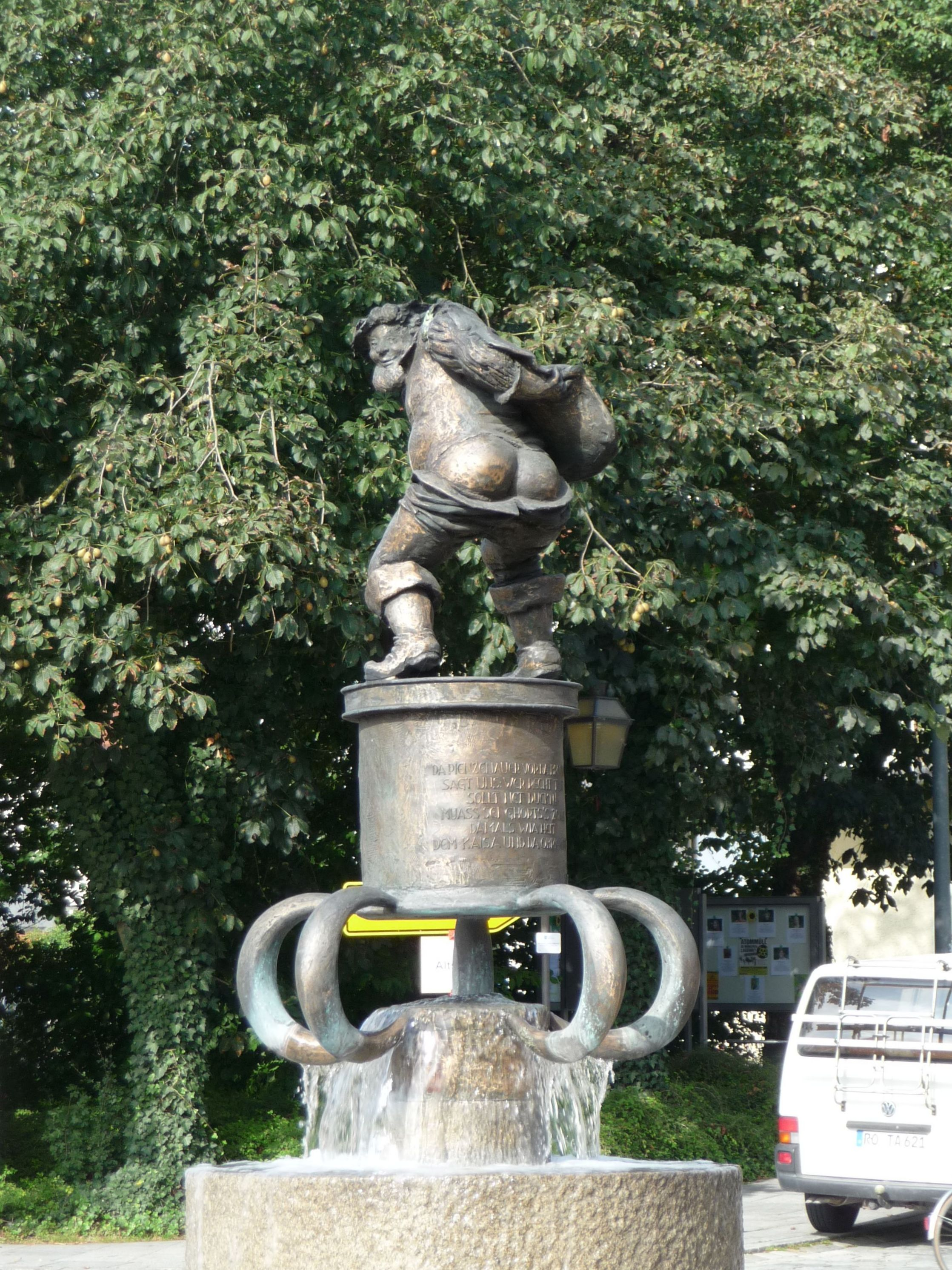 "Der Pienzenauer", Statue des Hans von Pienzenau, herzoglicher Pfleger von 1492 bis 1499 in Trostberg, soll König Maximilian I. das entblößte Hinterteil gezeigt haben